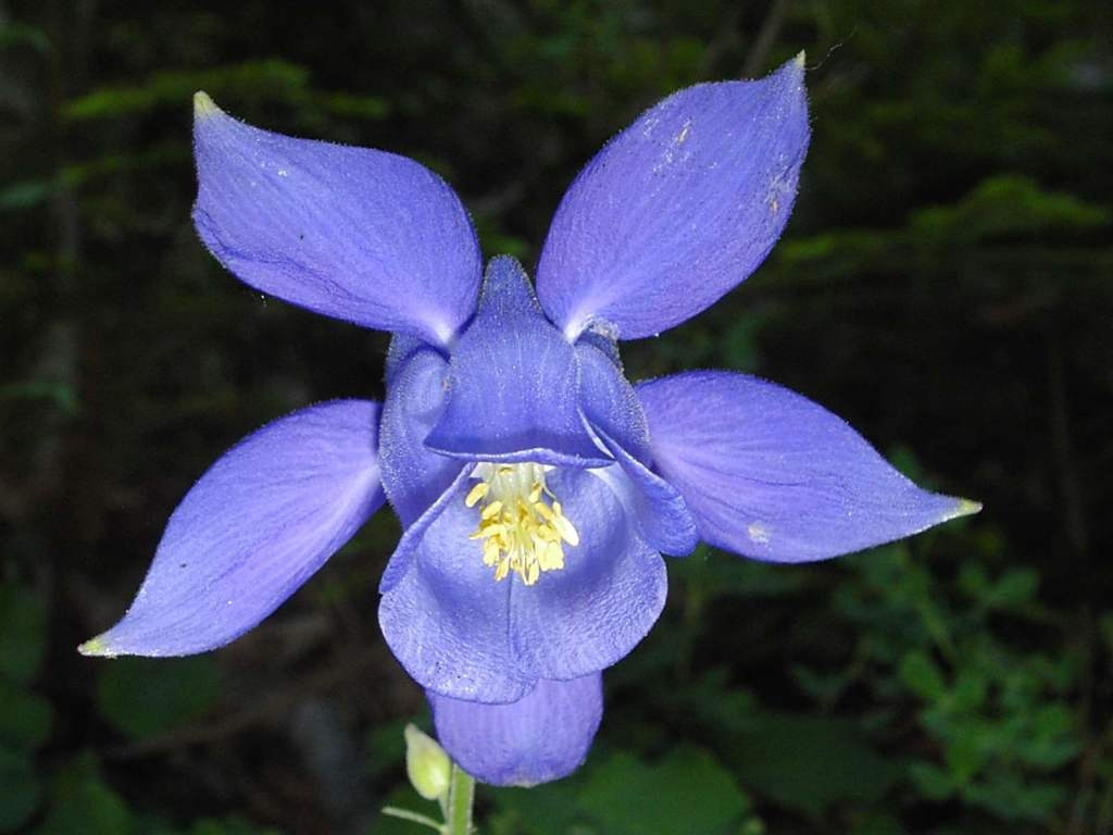 Aquilegia bertolonii Schott fleur flower flora Mont-Ventoux Vaucluse France EU